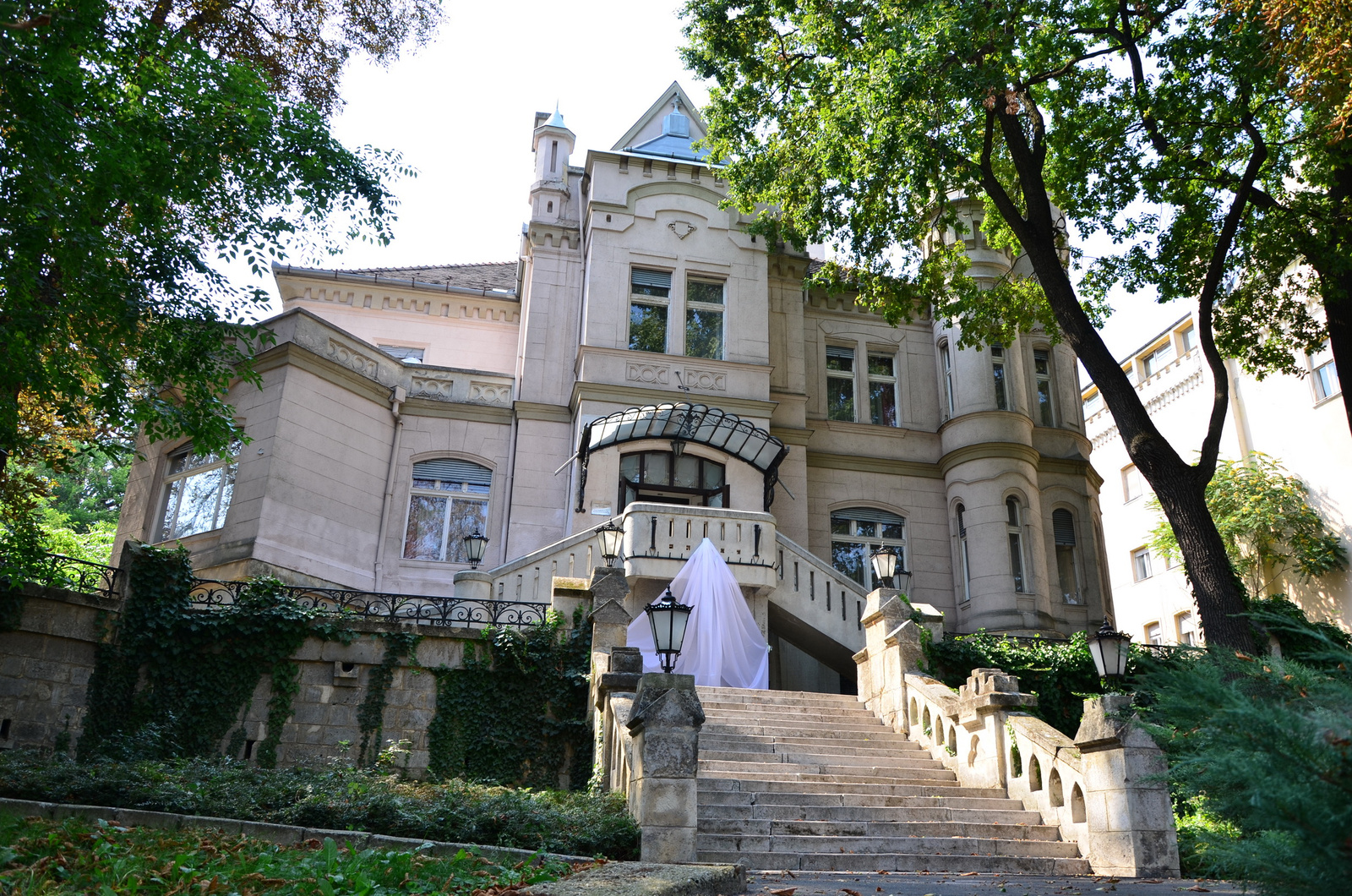 Sacelláry-kastély és kertje (Budapest 22, Anna u. 1-3.)